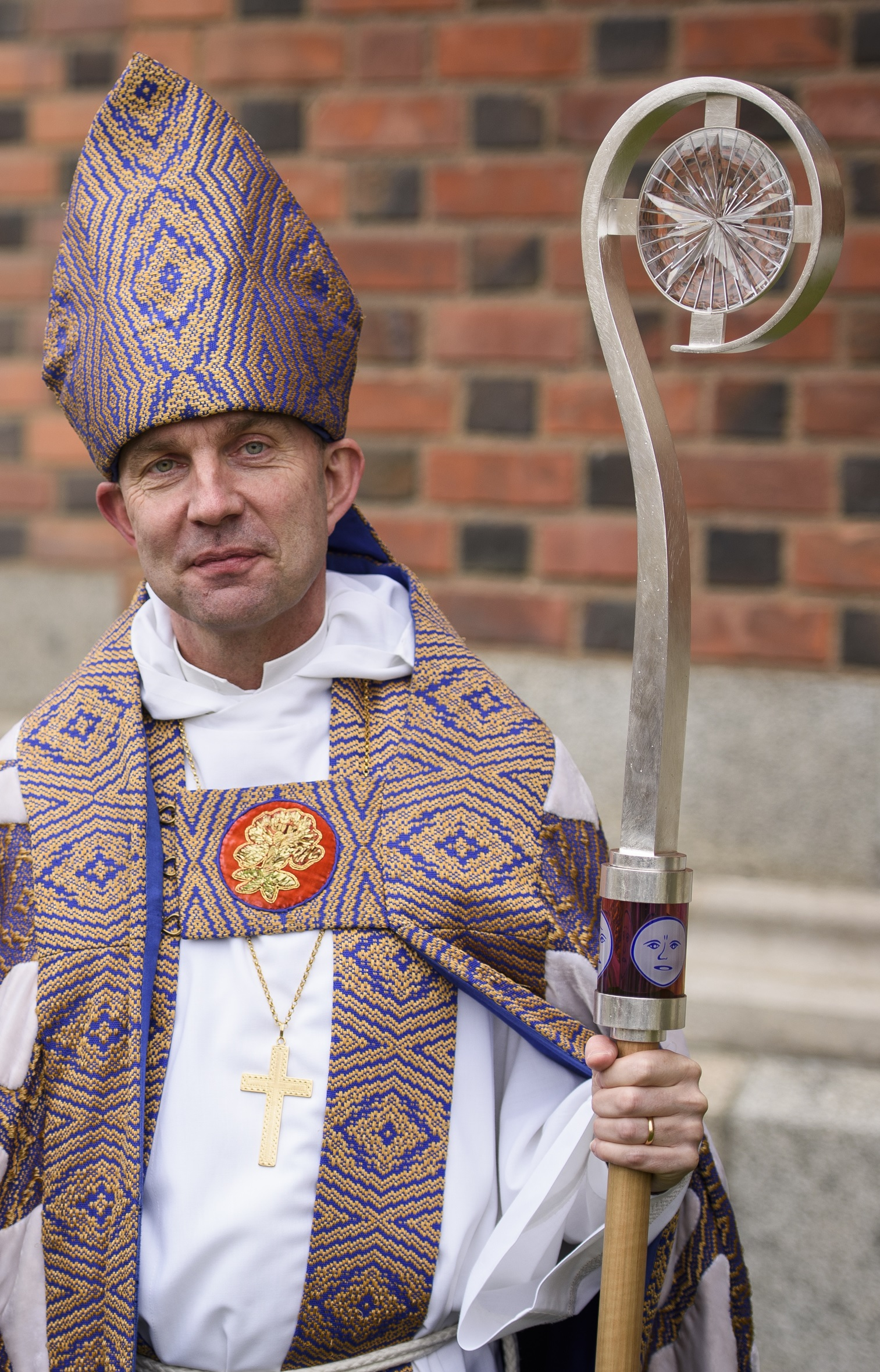 Fredrik Modéus vigdes till biskop för Växjö stift, i Uppsala domkyrka den 12 april 2015.